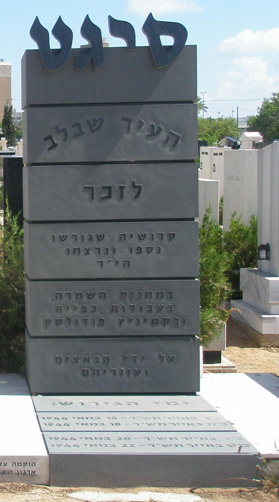 Sighetu_Marmaţiei memorial at Holon Cemetery